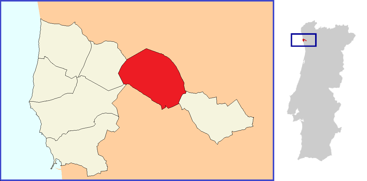 Mapa da freguesia de Rates